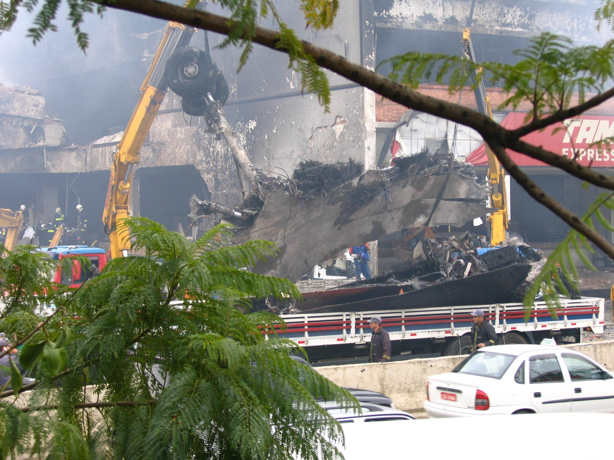 Restos dos destroços da aeronave.